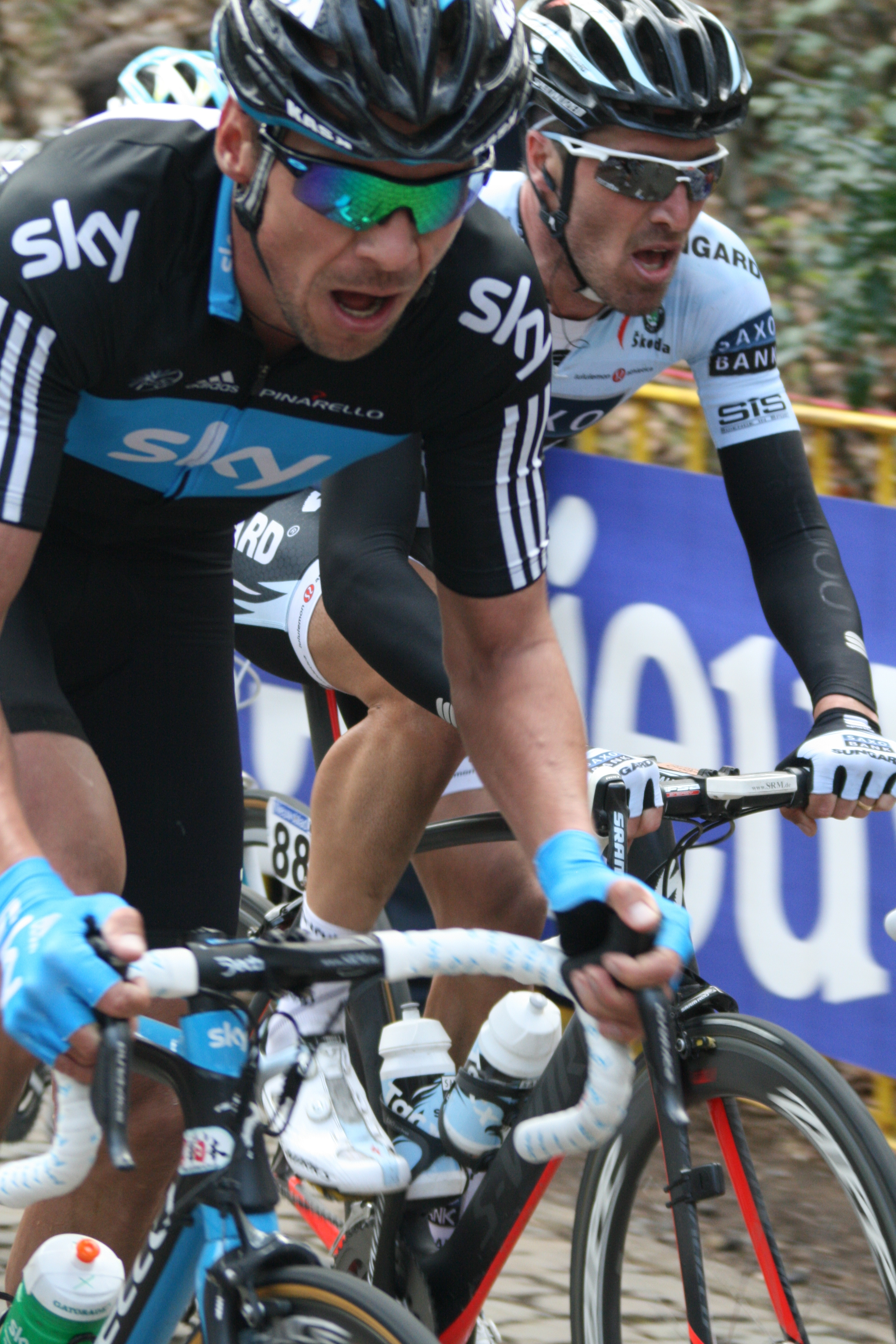 Gent-Wevelgem 2011, Kemmelberg